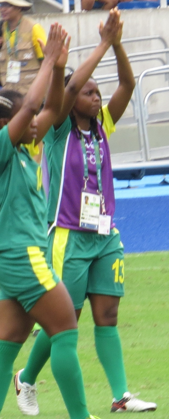 Futebol feminino Suécia 1 x0 Africa do Sul 03/08/16